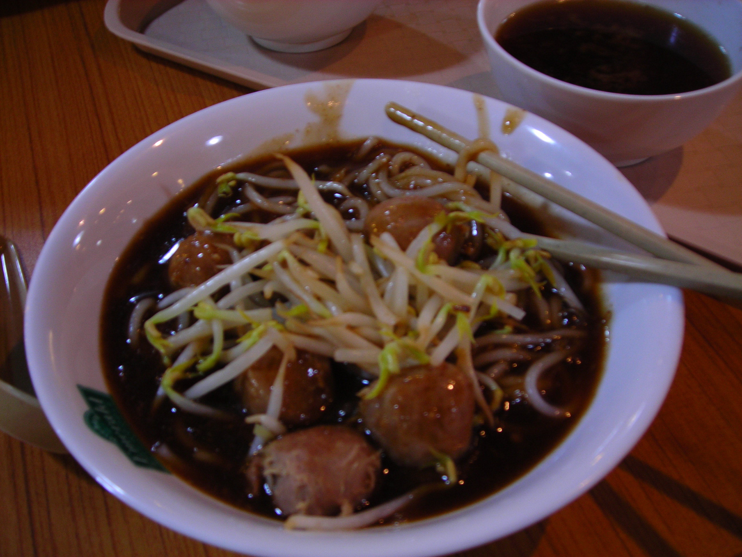 En typisk japansk matrett